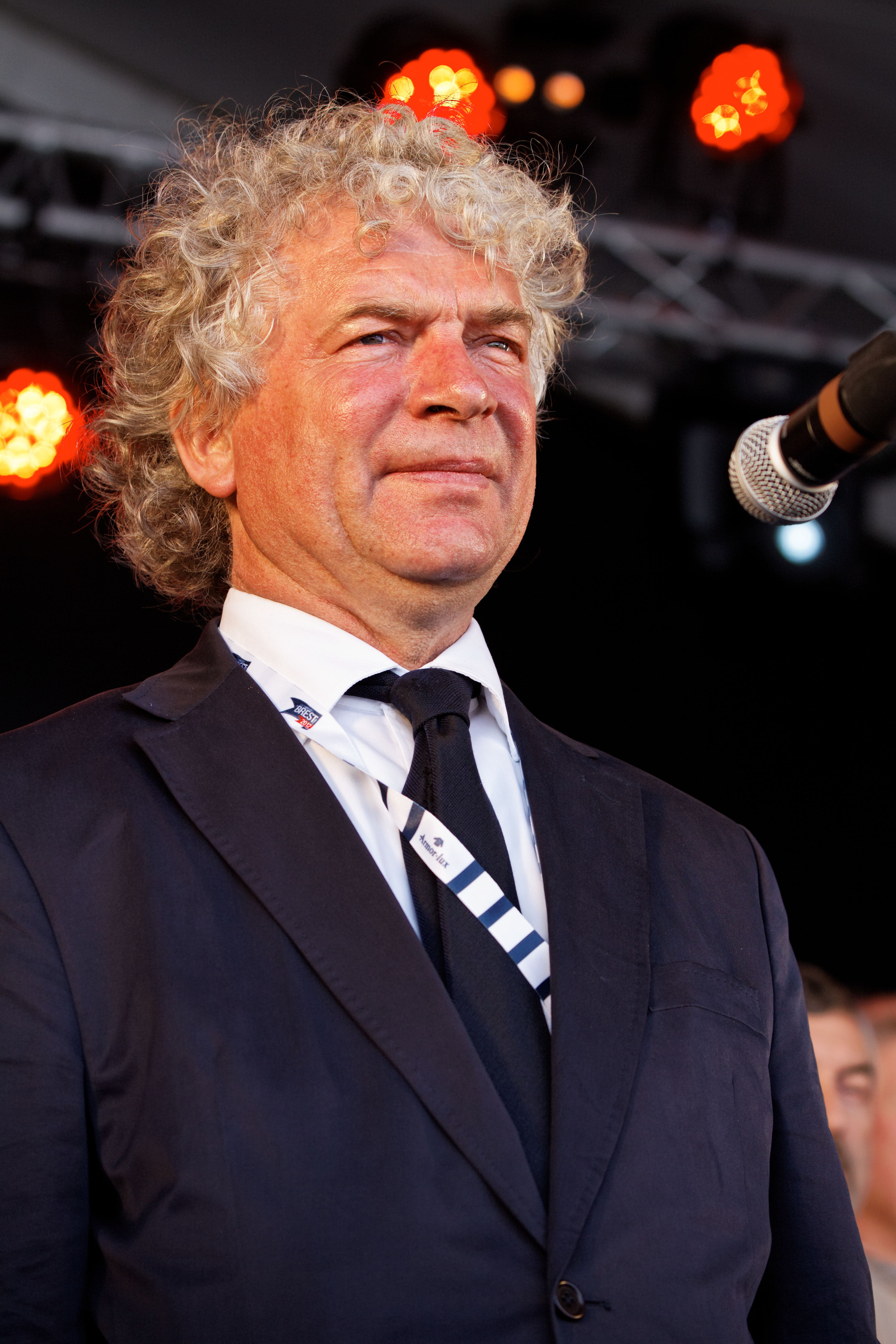 Inauguration du village Russie sous l'autorité de monsieur Alexandre Orlov, ambassadeur de Russie en France et monsieur François Cuillandre, Maire de Brest